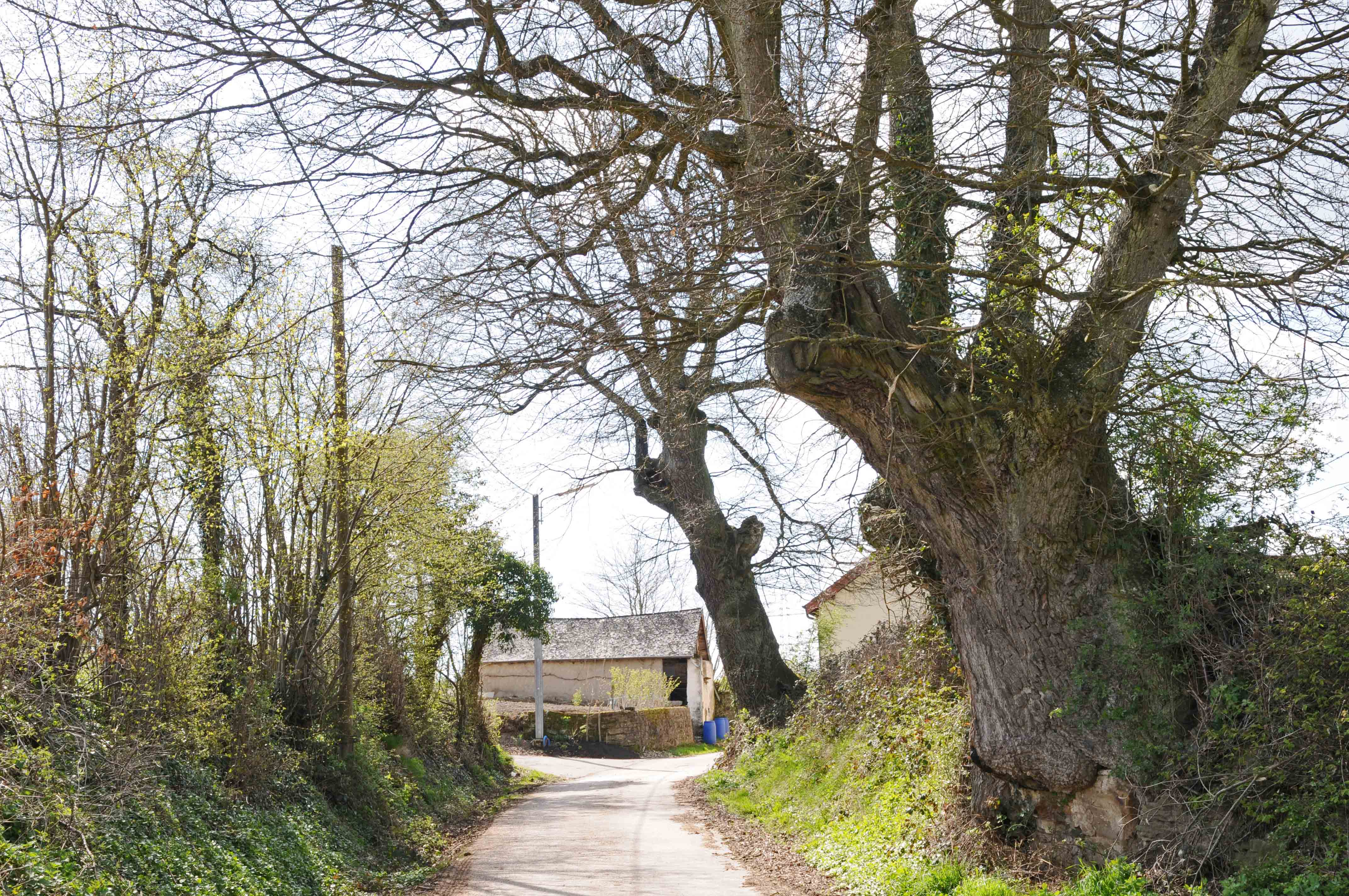 Eechen um Kinséckerhaff.